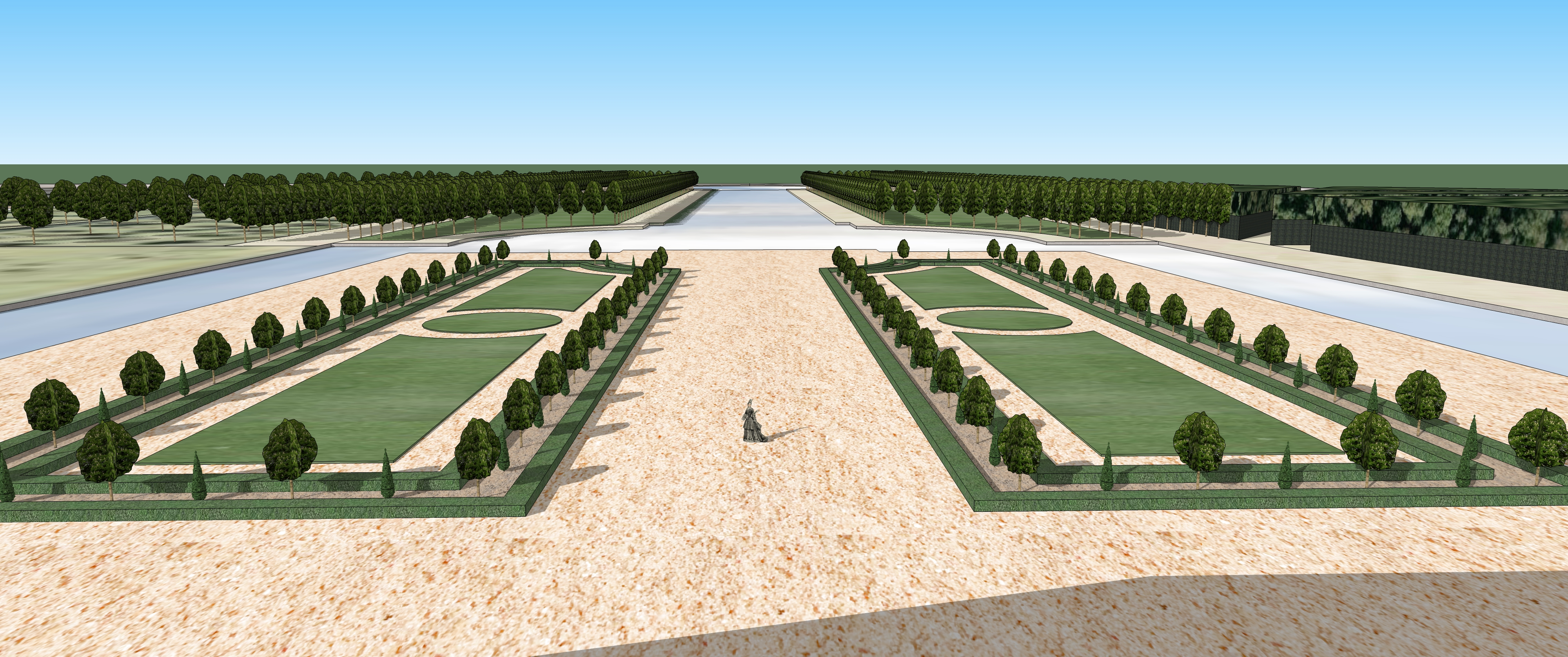 Vue du premier étage du château de Thorigny en direction du jardin. Vers 1710.